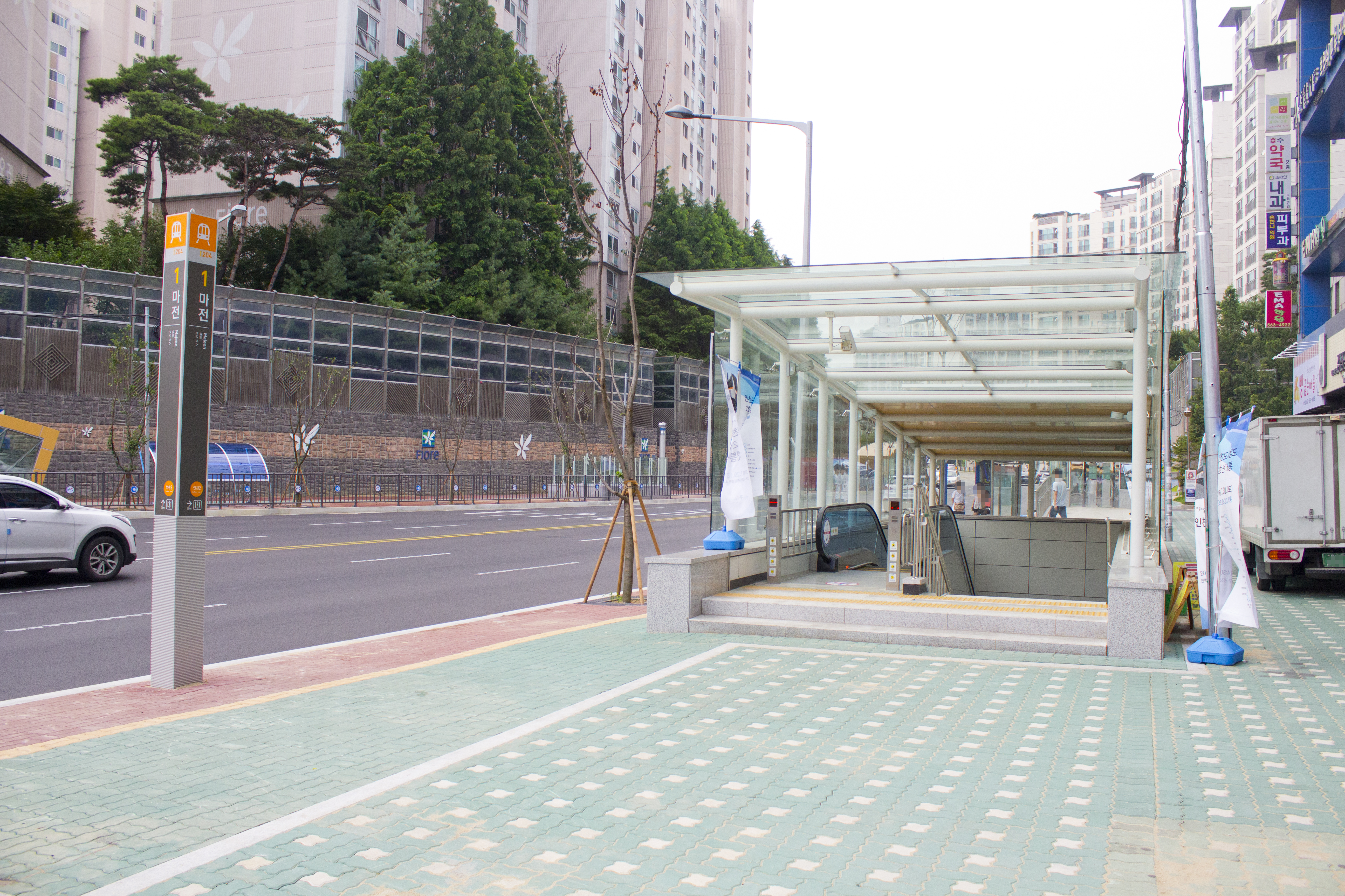 인천2호선 마전역 1번 출구